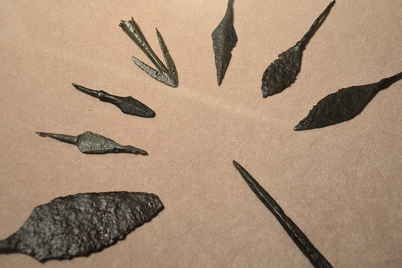 Lot von den sieben eisernen Pfeilspitzen mit breitem Blatt und Lanzenspitze aus dem Archäologische Museum Krakau